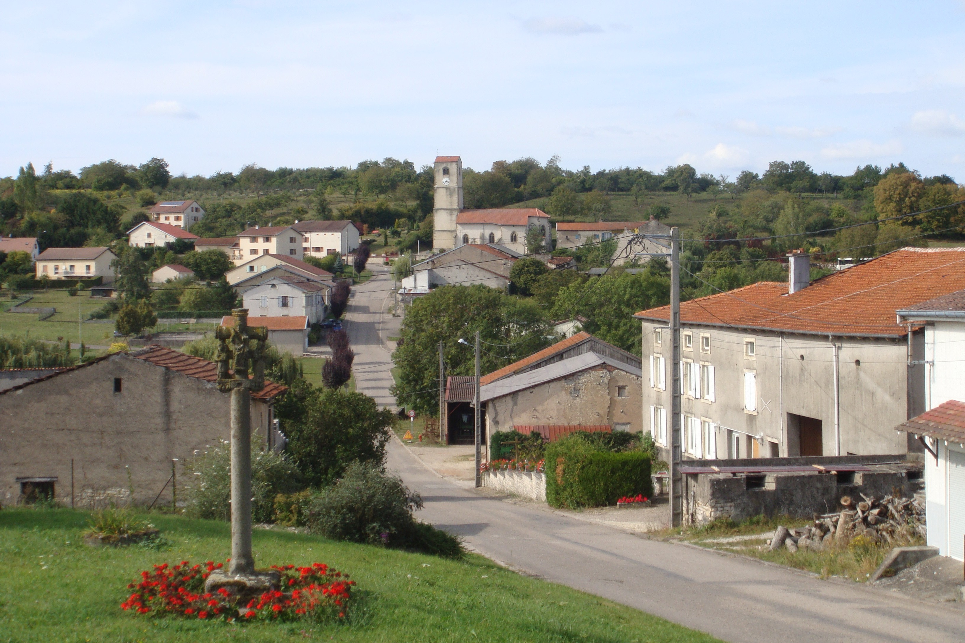 Gugney-aux-Aulx - Vue de la rue Berton et de la rue de l'Eglise. Elle peut être comparée aux cartes postales du début du XX° s. disponibles sur le site